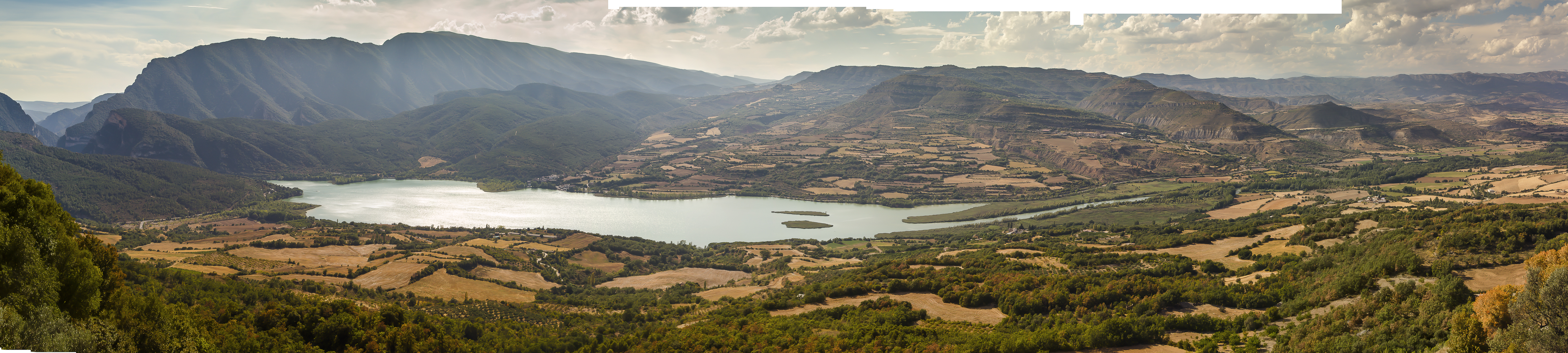 Panoràmica de l'embassament de Terradets, a la Noguera, presa des de Llimiana